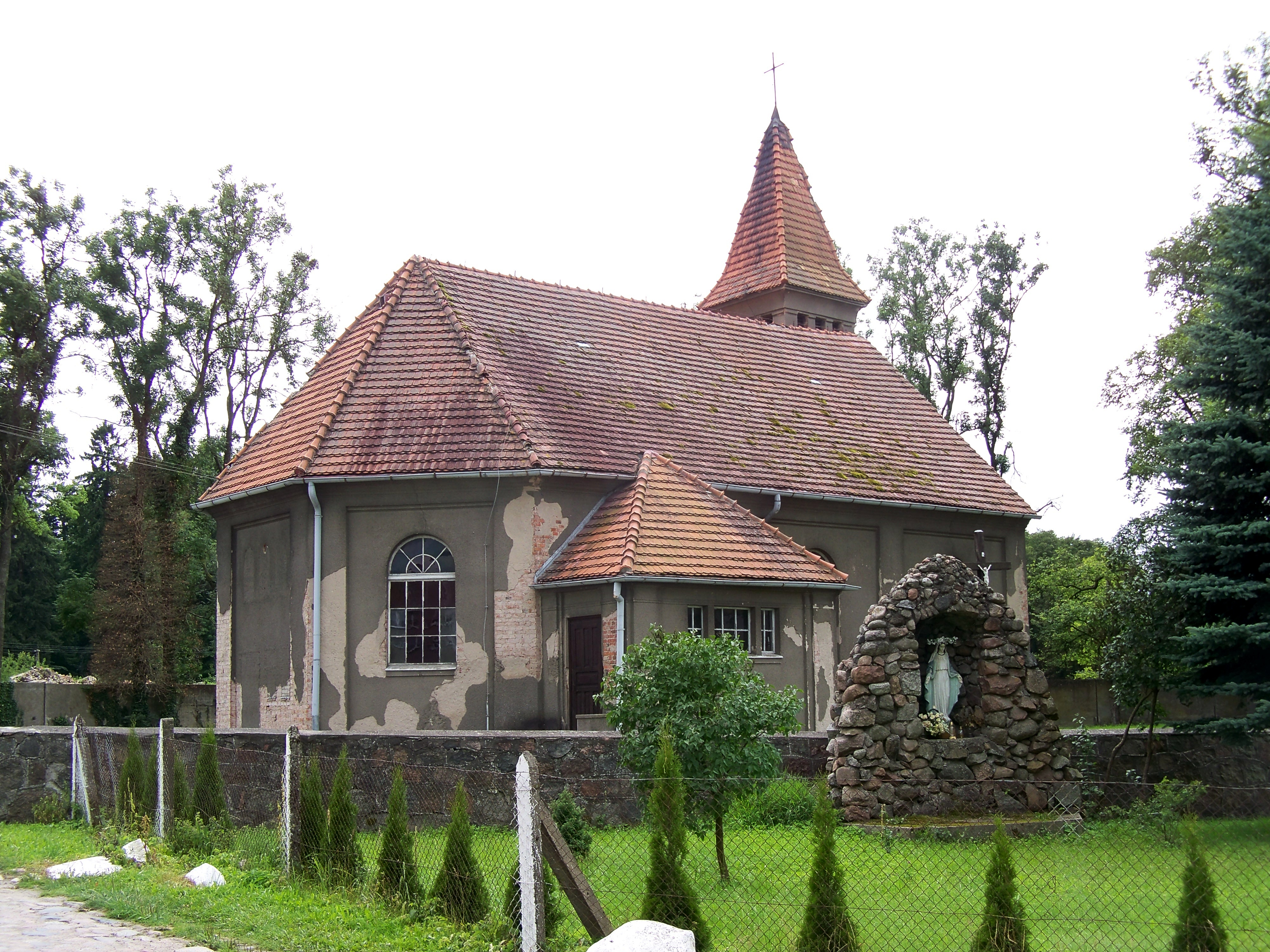 Kościół p.w. św. Marcina w Podwilczu.